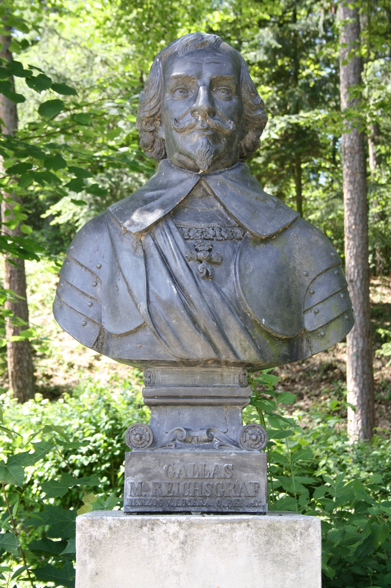 Büste in der Gedenkstätte Heldenberg (Niederösterreich)